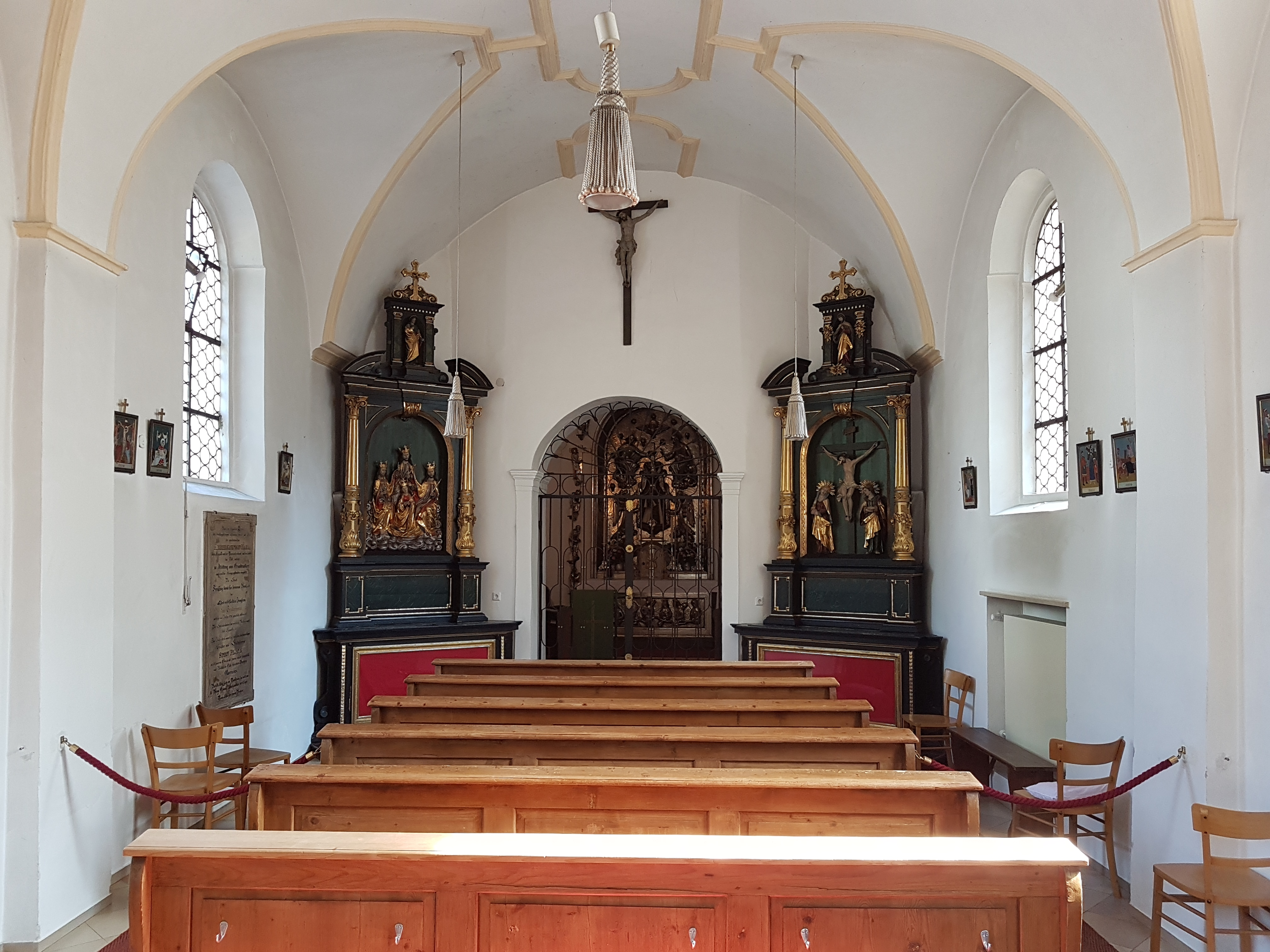 Altöttinger Kapelle (Freising), Innenraum mit Blick zum Chor